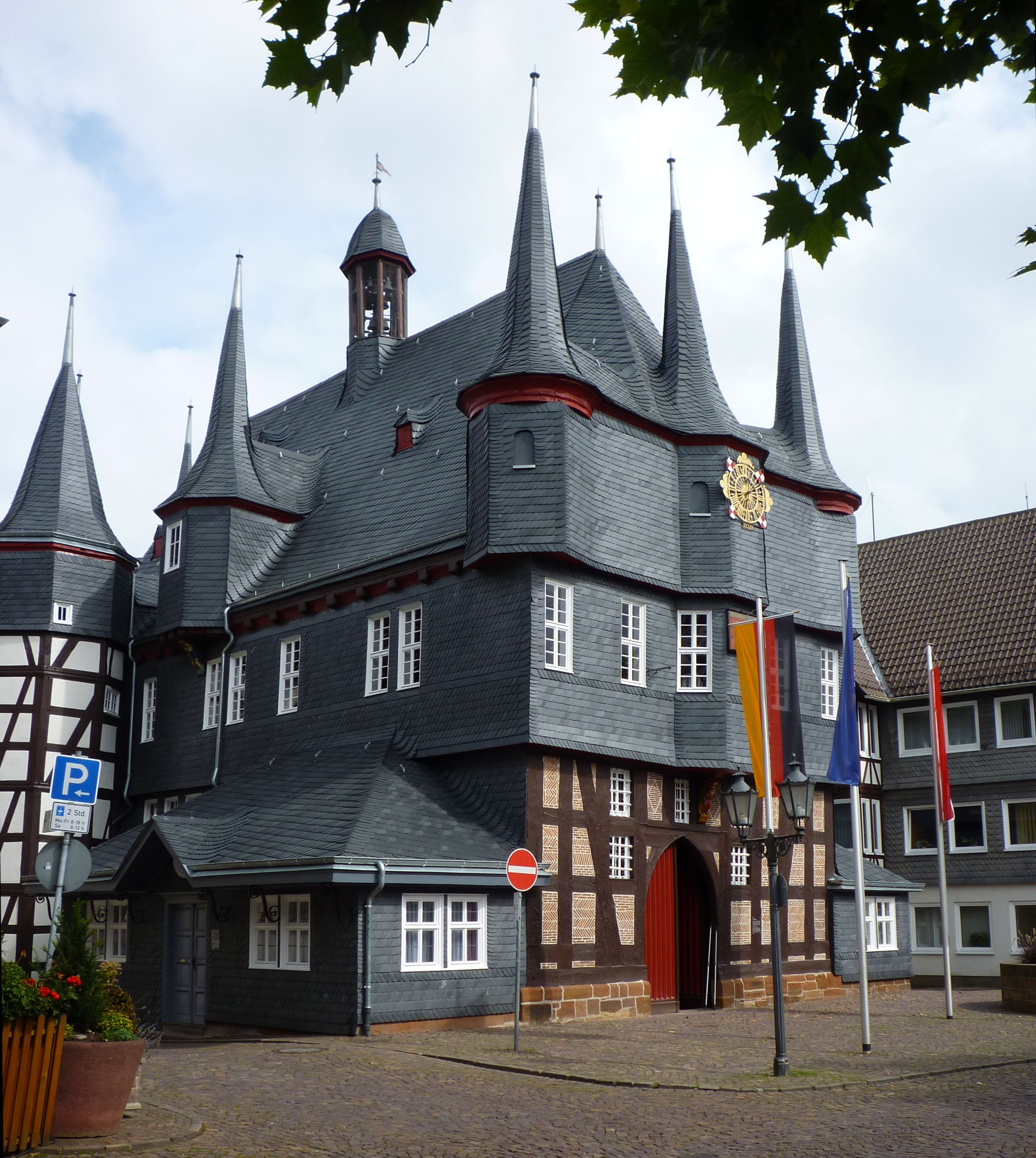 Frankenberg - Rathaus_02